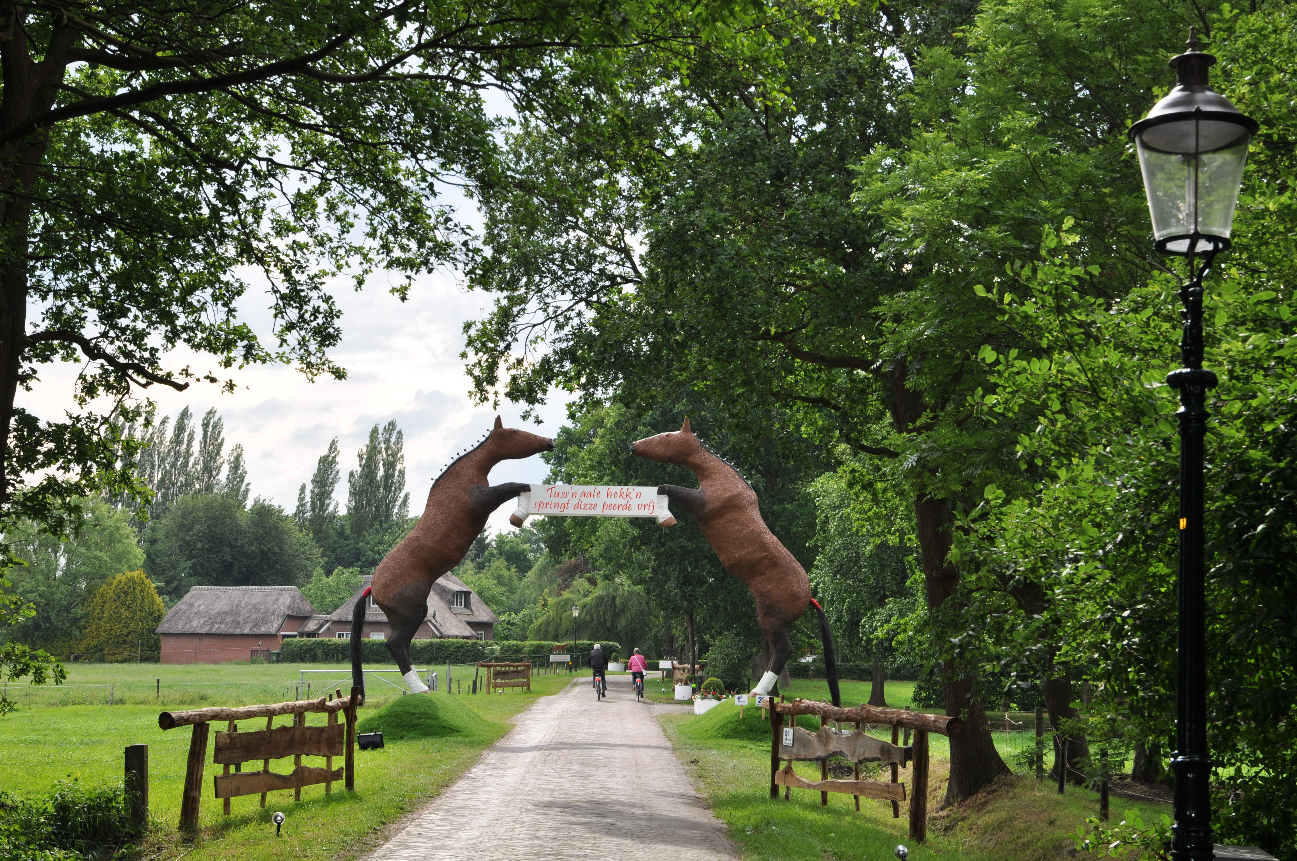 Straatversiering tijdens Zuidenveld Schoonebeek 2012.